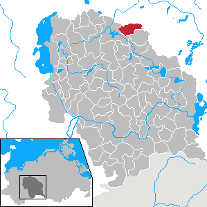 Witzin in Mecklenburg-Vorpommern - District Parchim